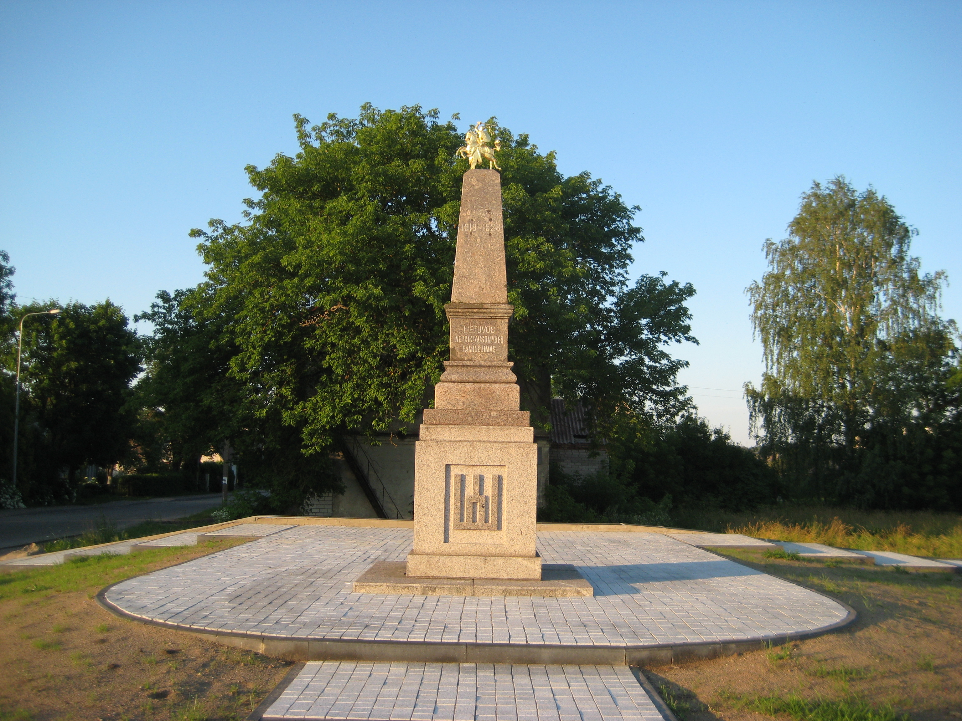 Senoji Varėna, Lithuania